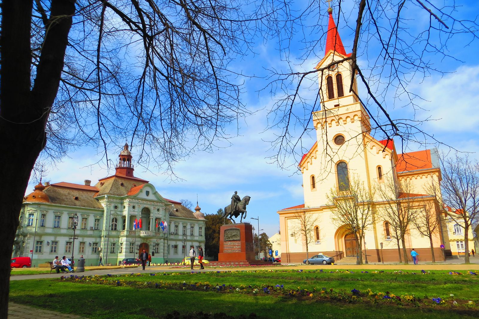 Trg slobode